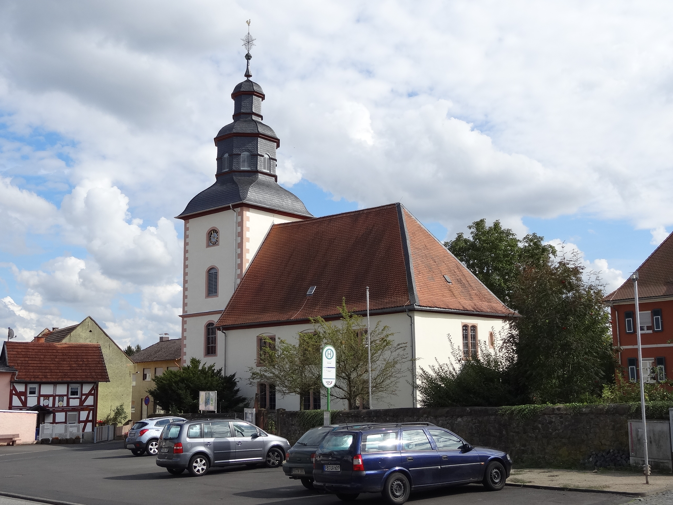 Evangelische Kirche Bellersheim